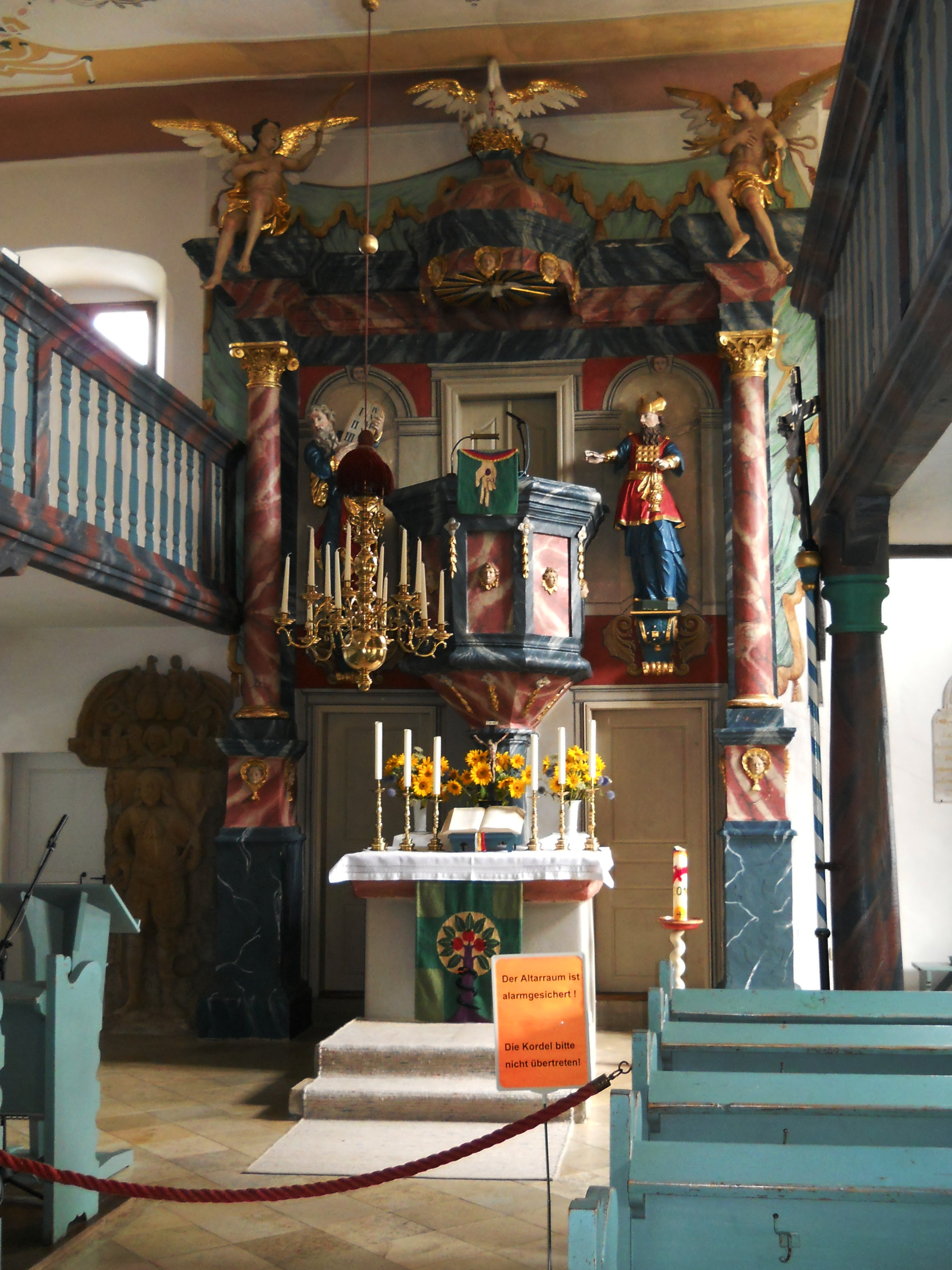 Kanzelaltar (um 1750) in der Kirche St. Bartholomäus in Egloffstein in der Fränkischen Schweiz